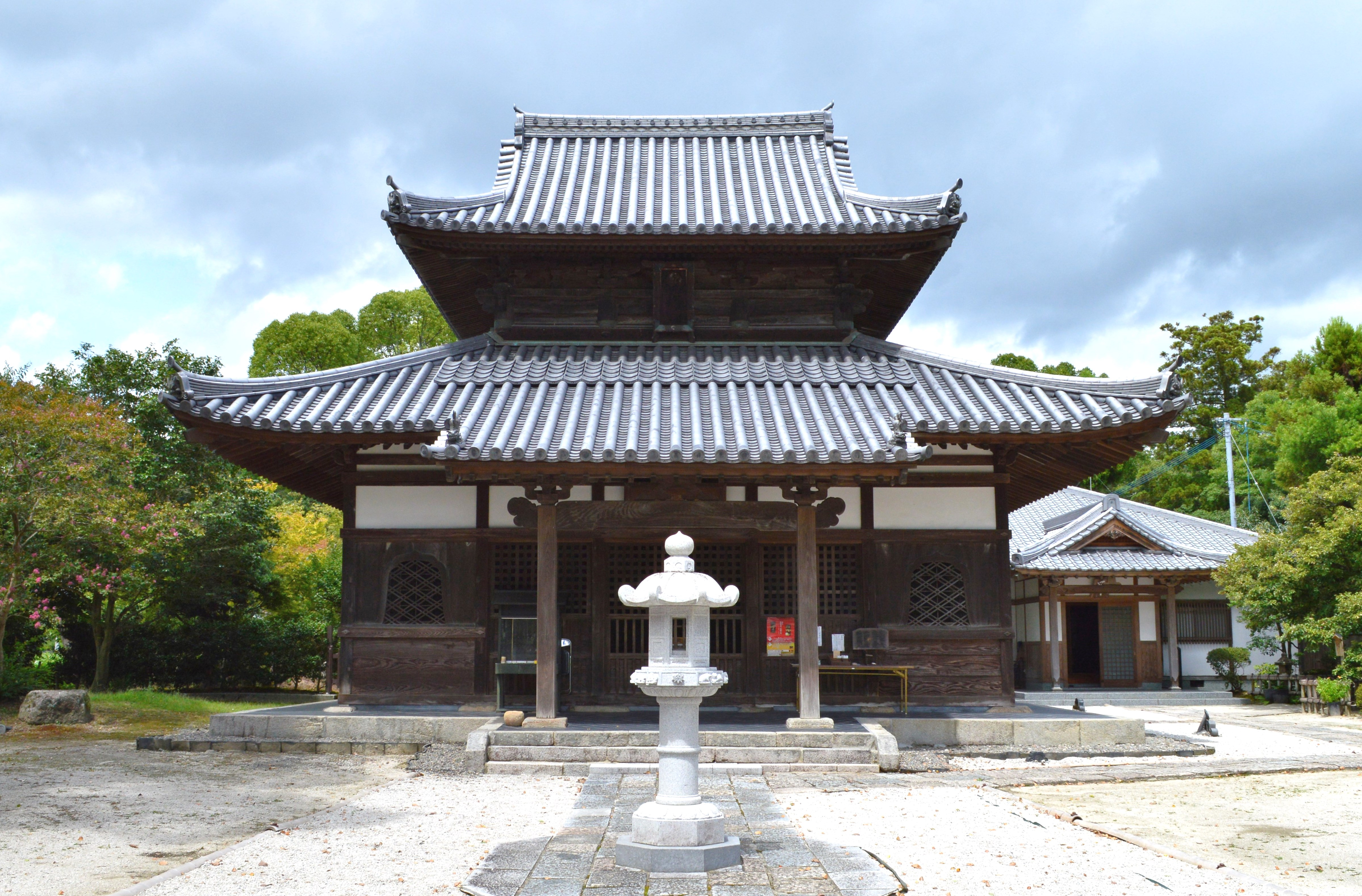 戒壇院 本堂